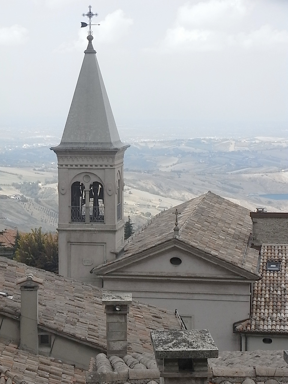 Fürbittkirche in Borgo Maggiore